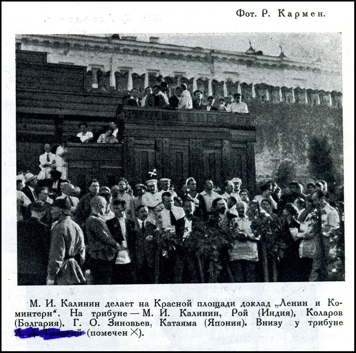 М. И. Калинин делает на Красной площади доклад «Ленин и Коминтерн». Июнь 1924